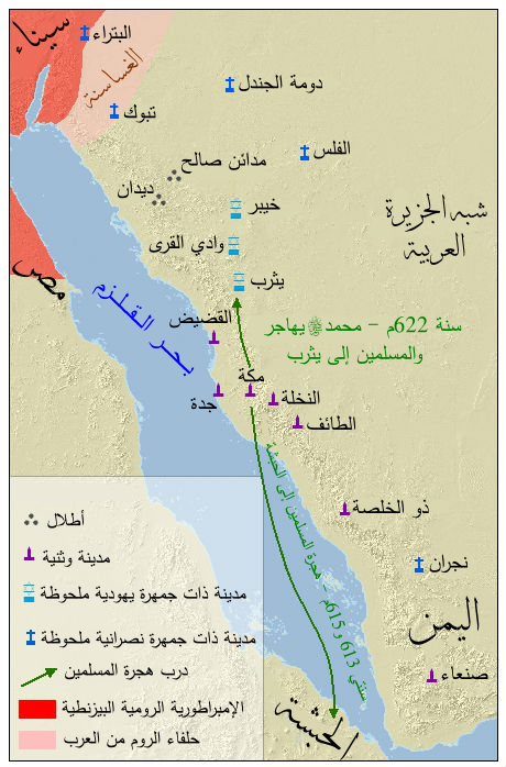 خارطة لِشبه الجزيرة العربيَّة في أوائل العهد النبويّ، تظهرُ فيها المراكز الدينيَّة الرئيسيَّة، ومسار هجرة الرسول مُحمَّد إلى يثرب، ومسار هجرة أصحابه إلى الحبشة سابقًا.